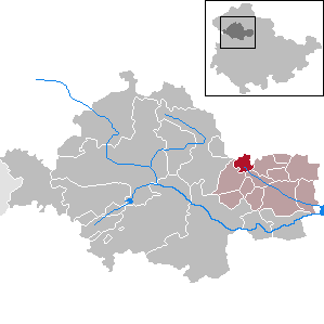 Blankenburg in Thuringia - Unstrut-Hainich-Kreis